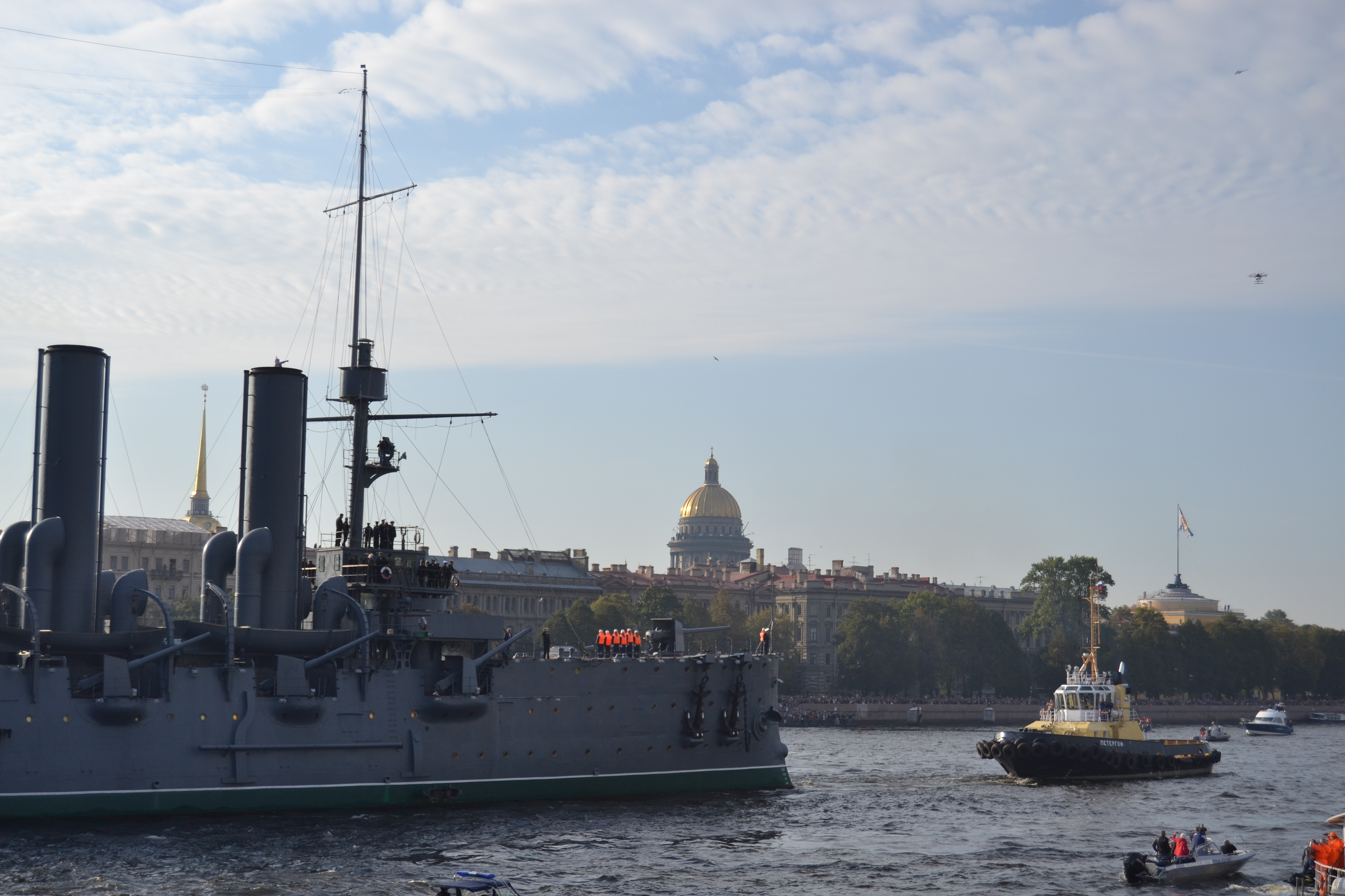 Буксировка Авроры